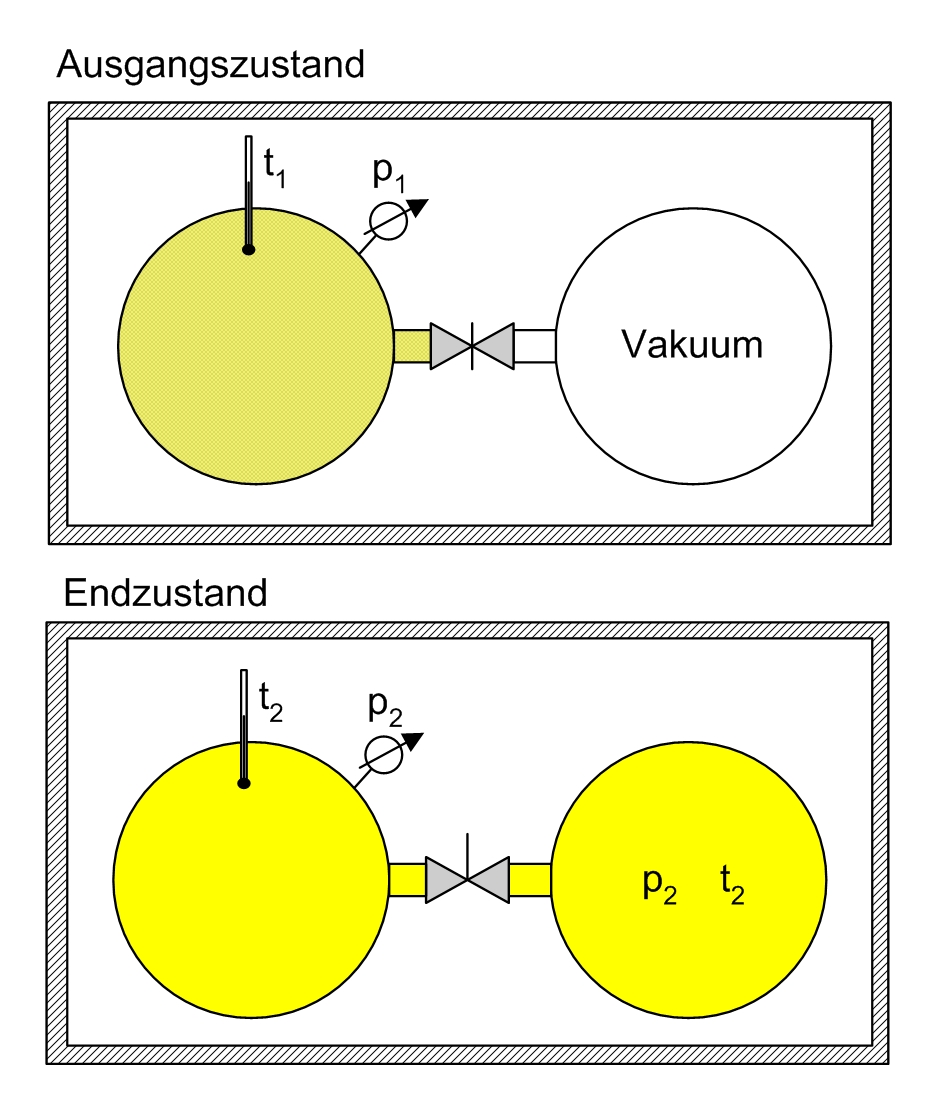 Versuch von Gay-Lussac